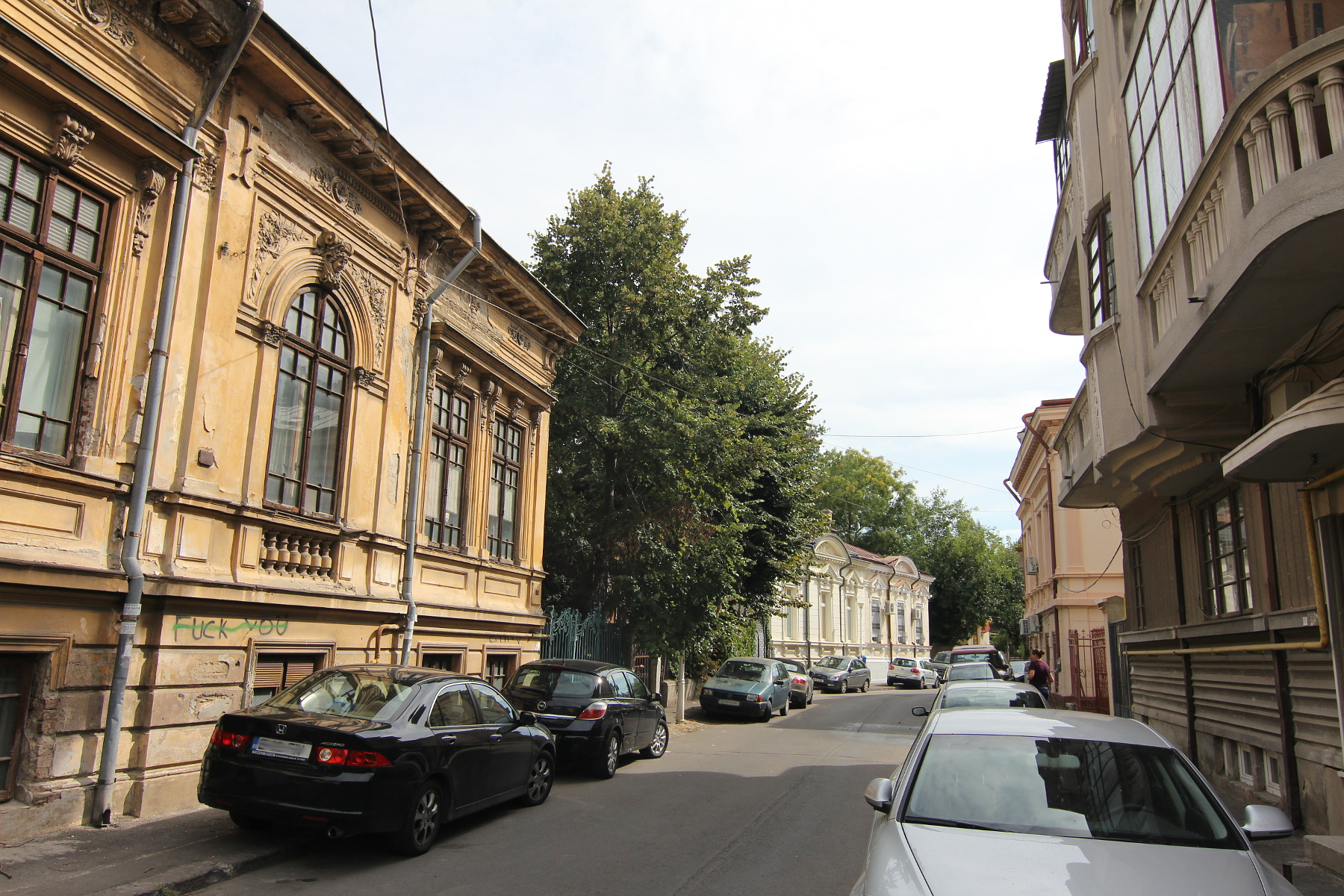 Ansamblul de arhitectură "Str. Romulus"